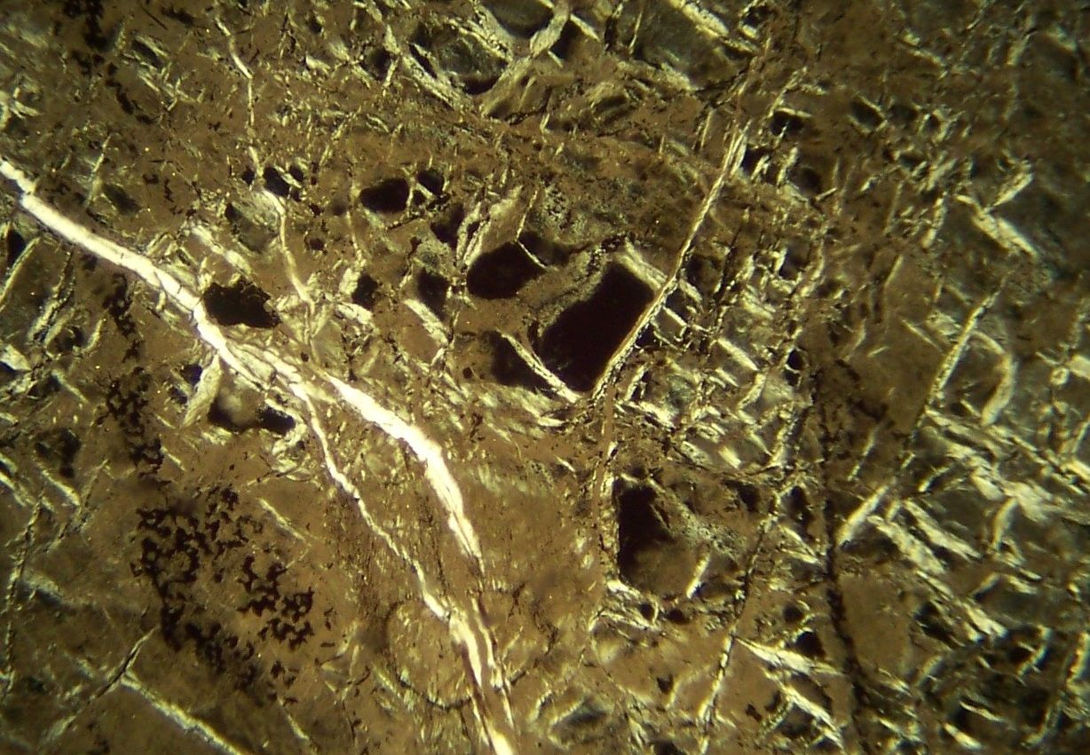 Szlif cienki serpentynitu antygorytowo-chryzotyowego. Prawie prostopadłe przerosty antygorytu są reliktem po ortogonalnej łupliwości piroksenów.